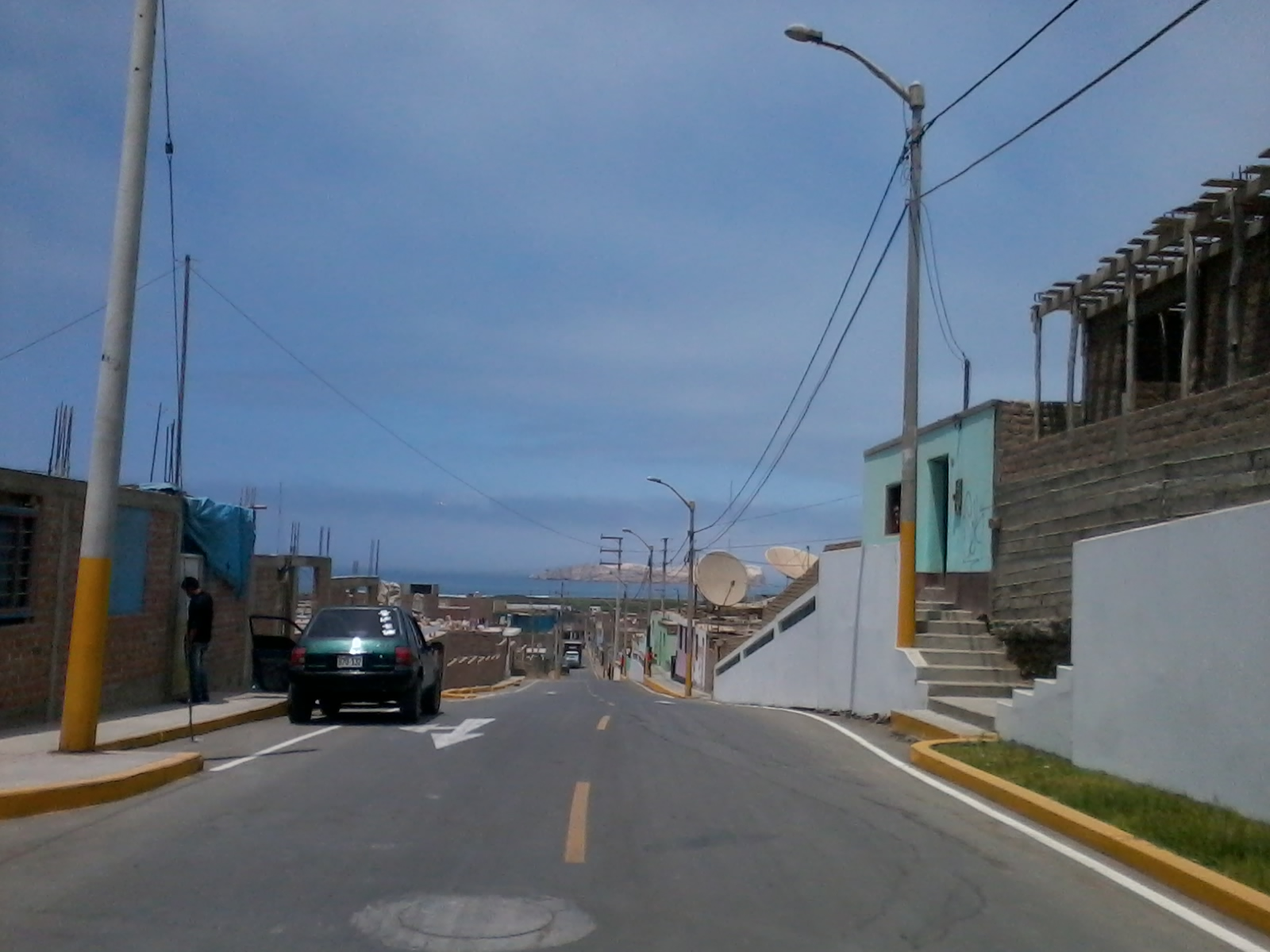 Al fondo la hermosa vista de la Isla Don Martin